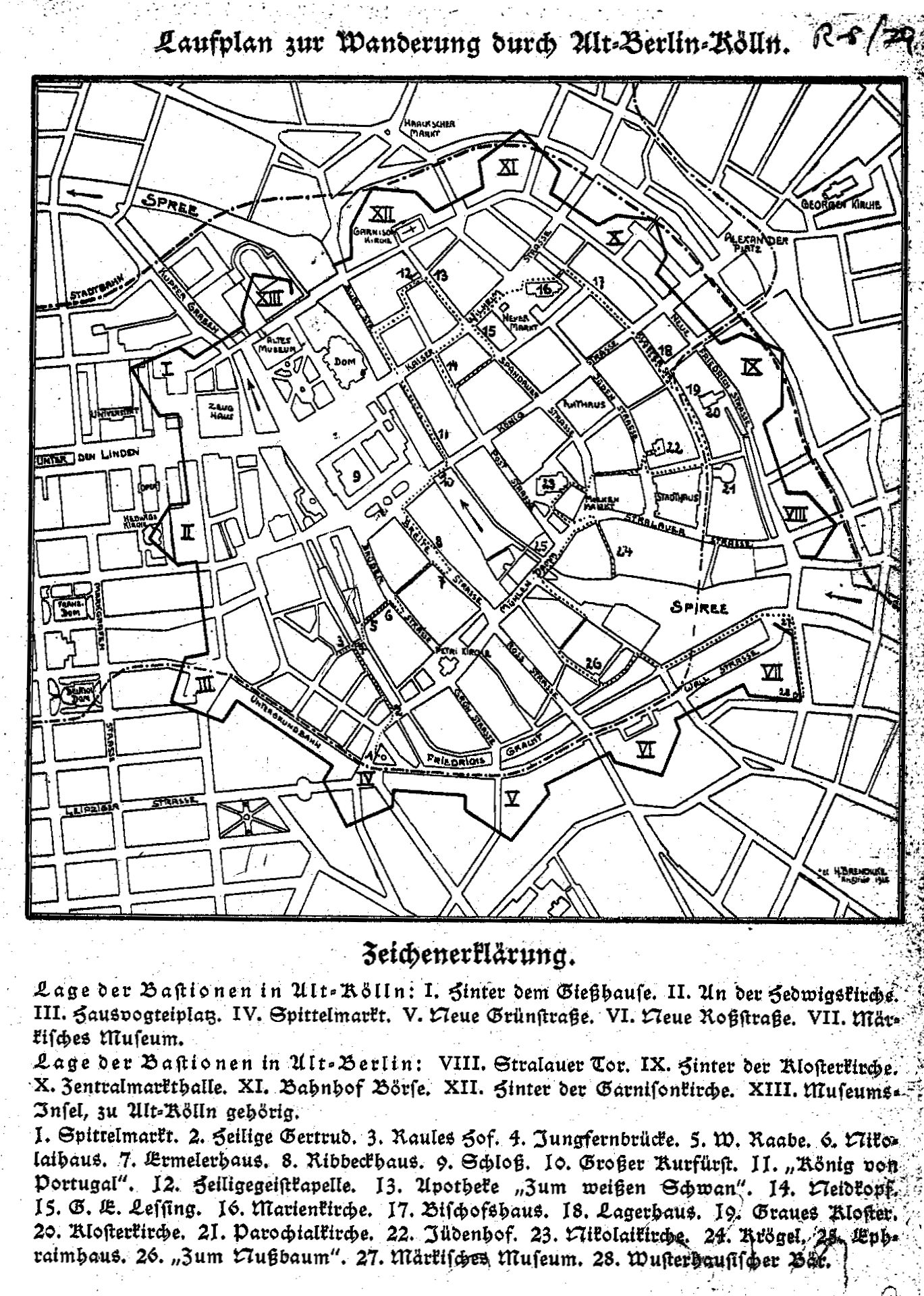 (Wander-)Plan für Alt-Berlin-Kölln